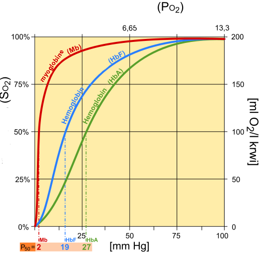 Fetal hemoglobin